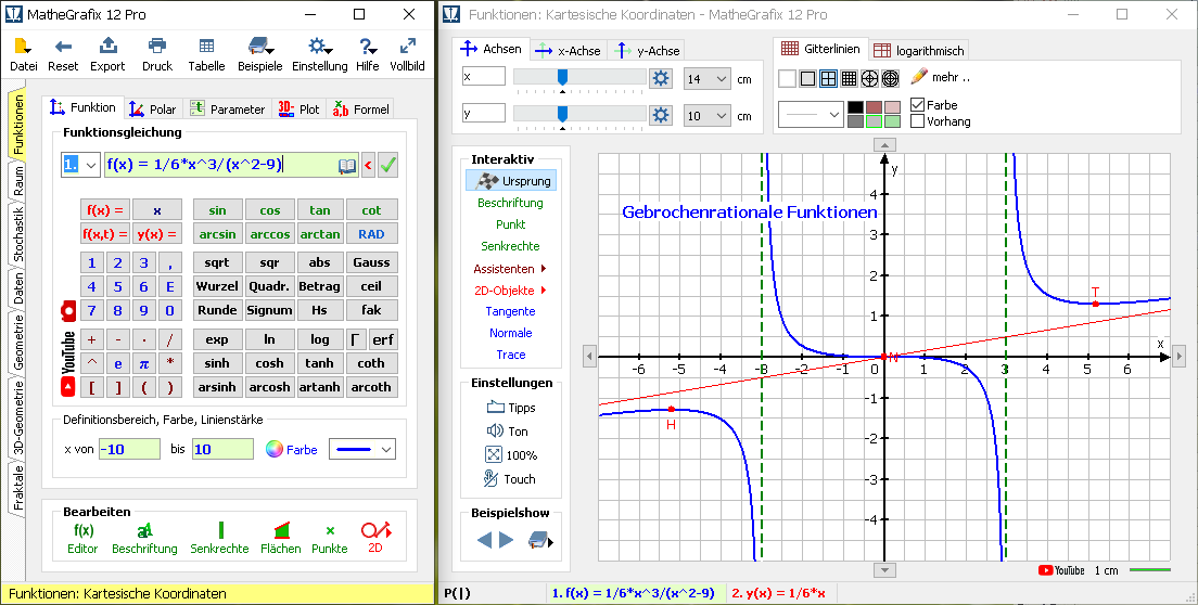 Screenshot: Benutzeroberfläche von MatheGrafix